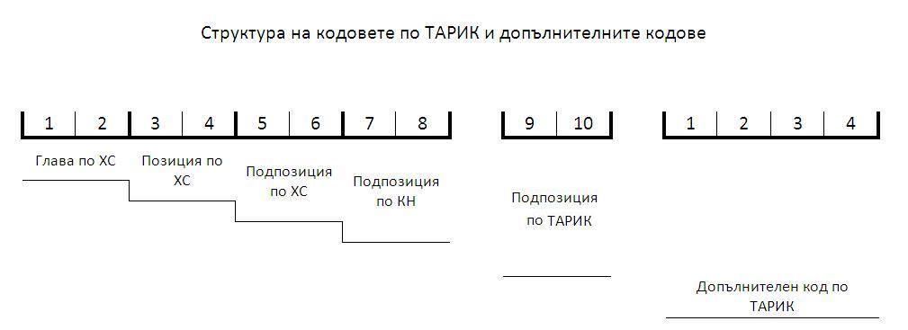 Структура на кодовете по ТАРИК